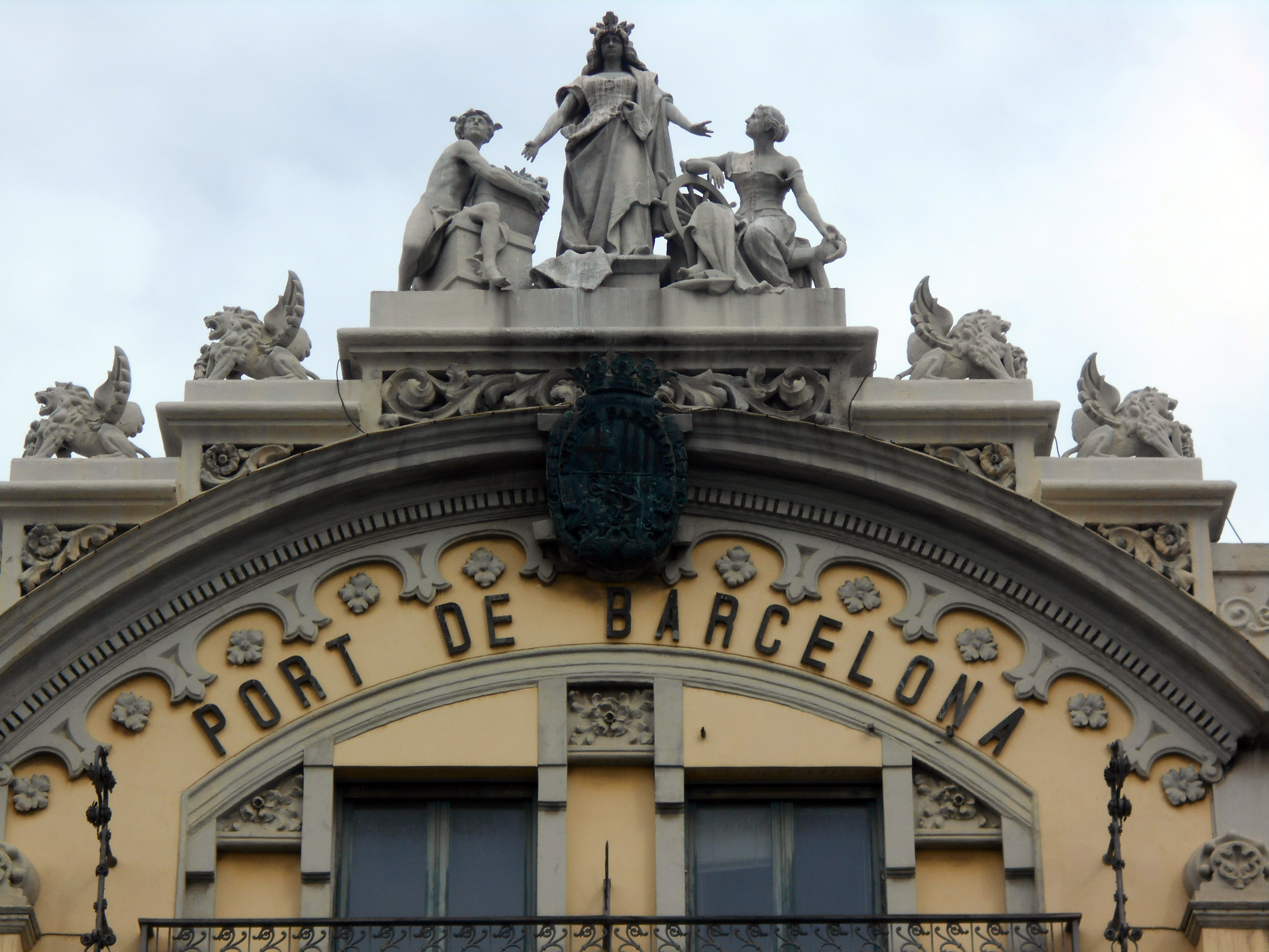 Barcelona protege la Marina y el Comercio, edificio de la Junta de Obras del Puerto.